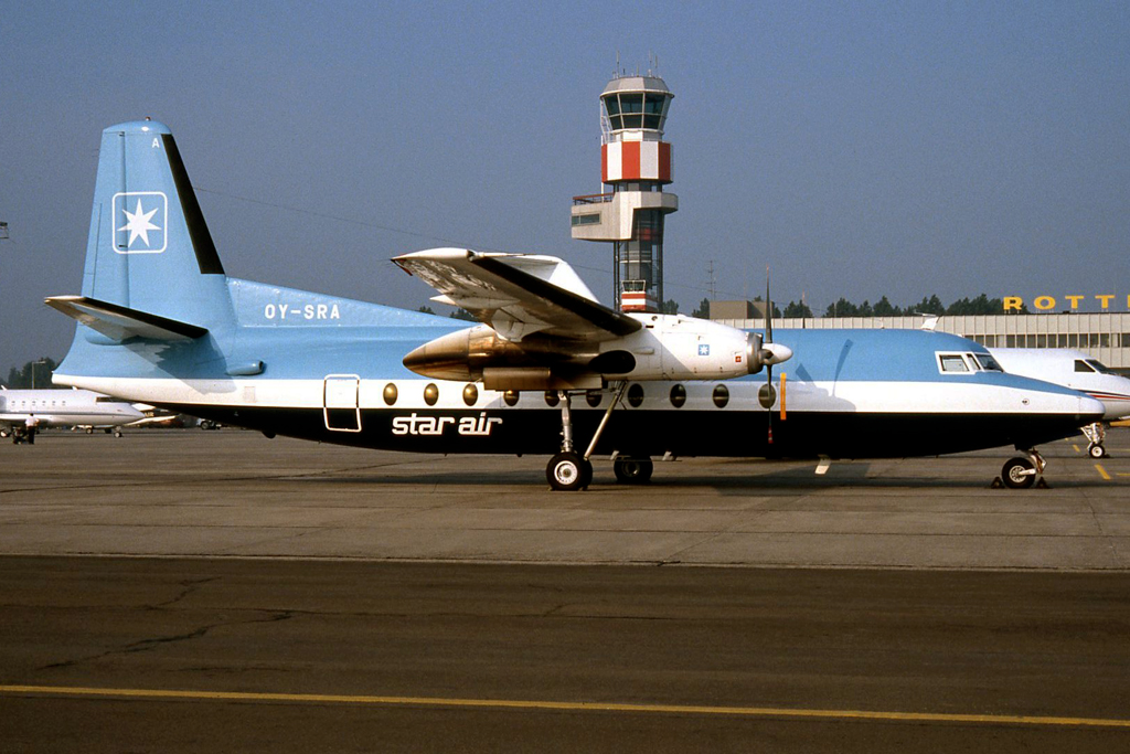 OY-SRA Fk27 Star Air